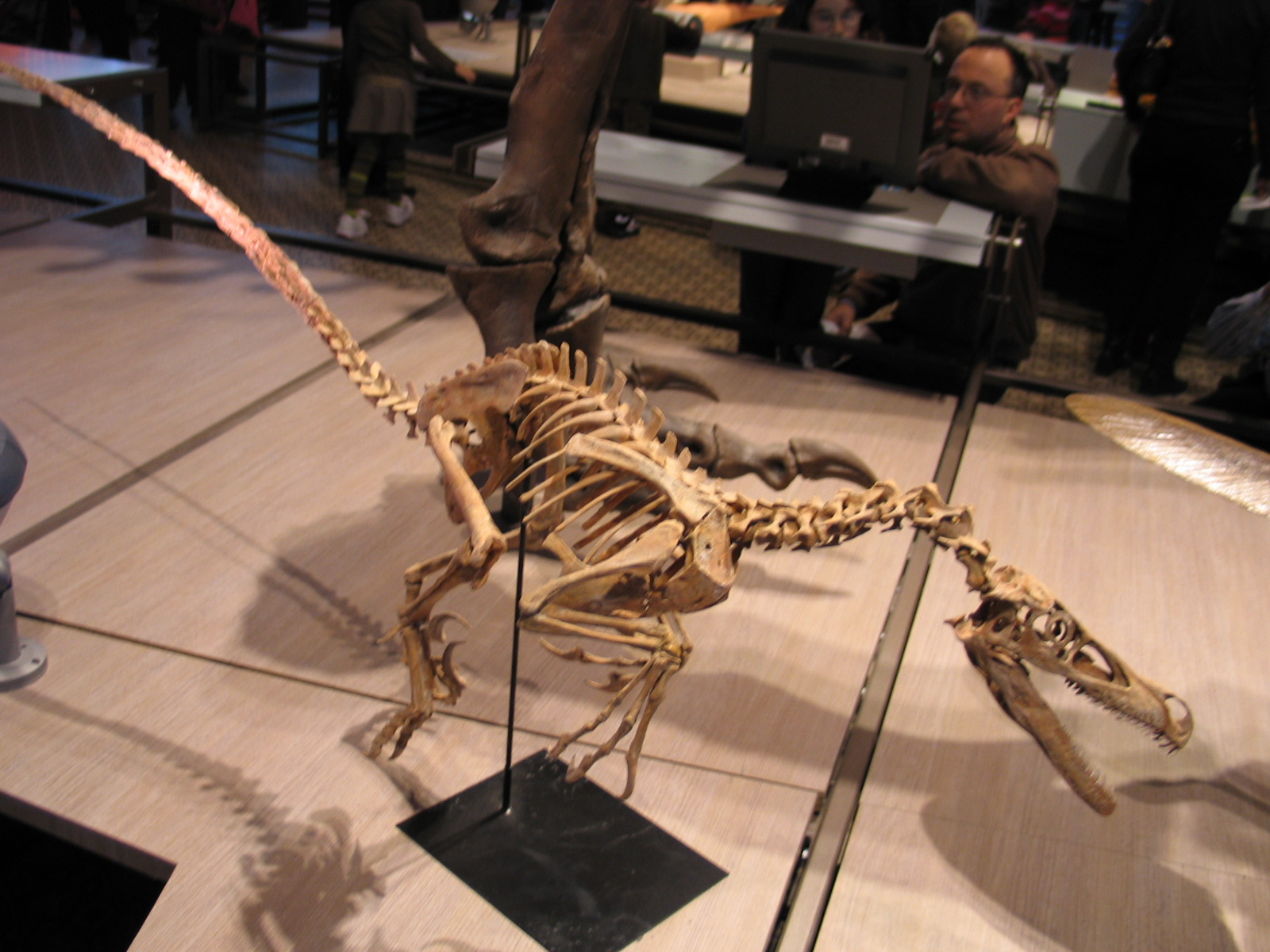 Velociraptor species at the Museum voor Natuurwetenschappen in Brussels, Belgium